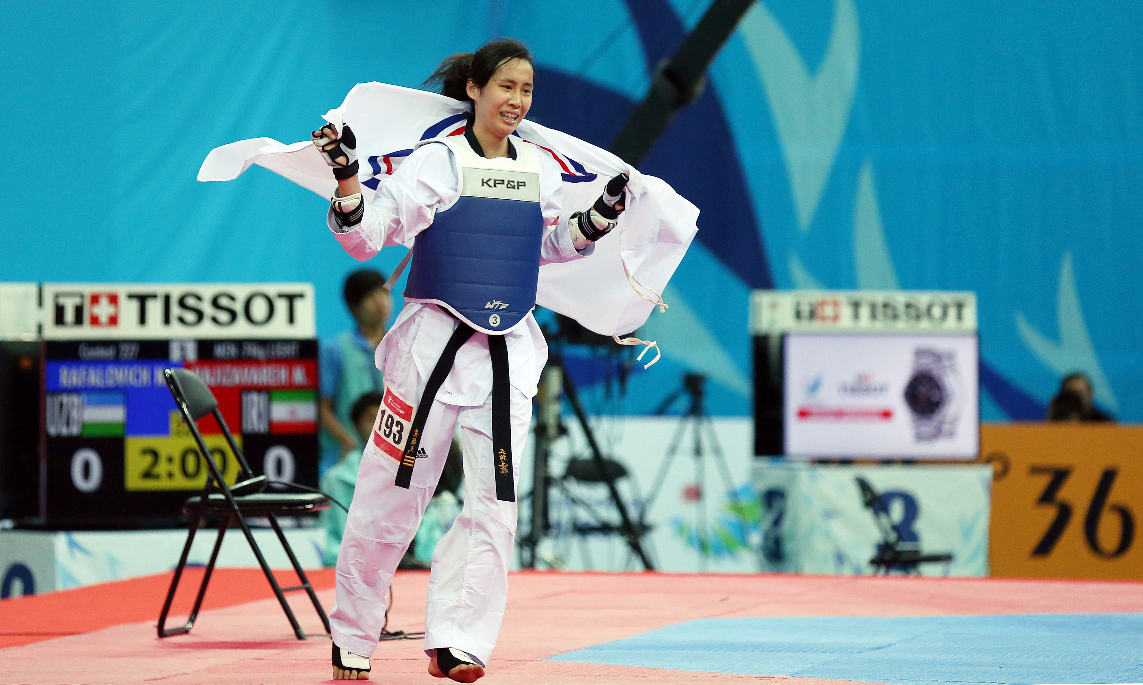 윤정연 은메달